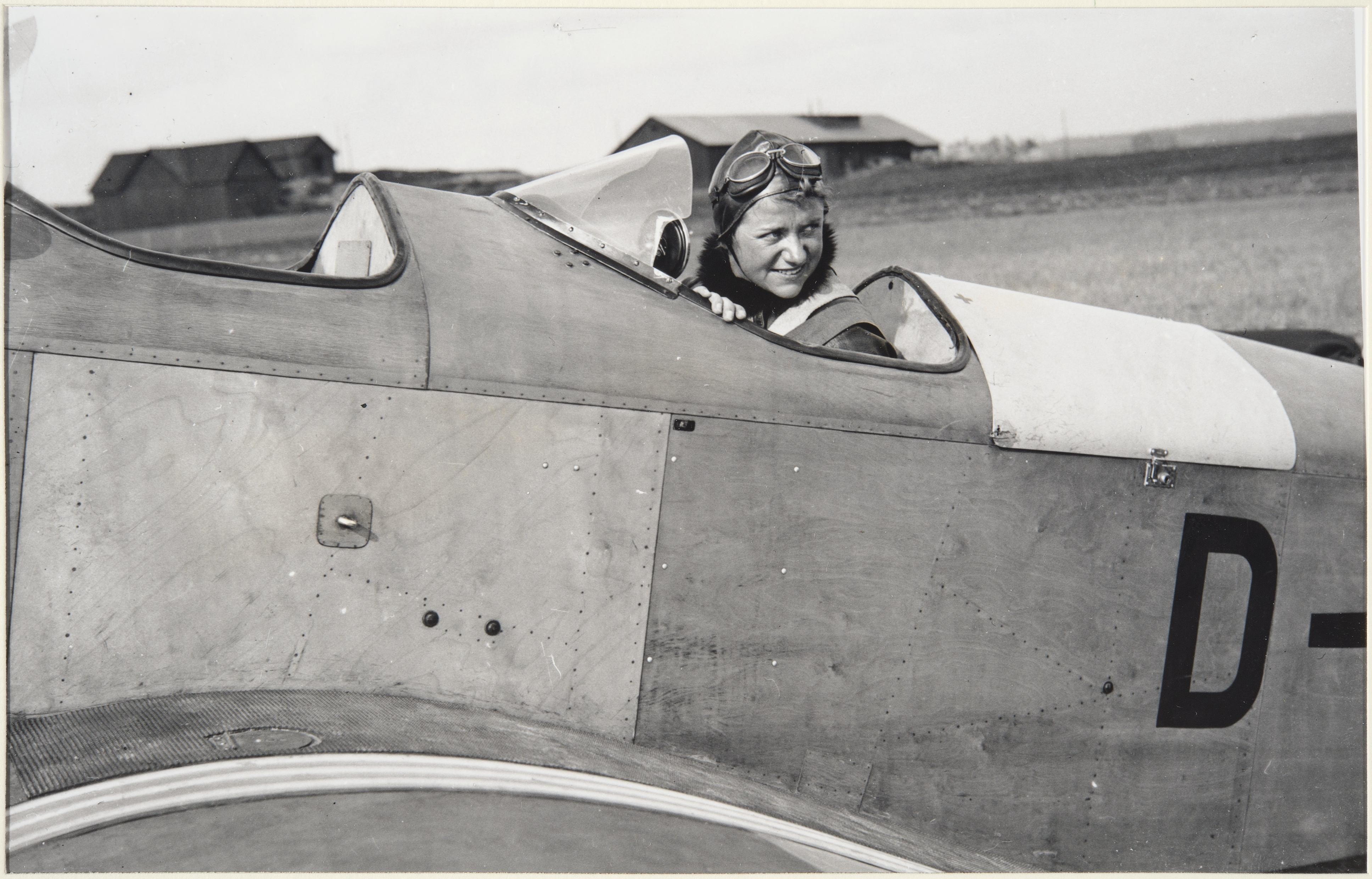 Hanna Reitsch lentokoneessaan Tuomarinkylän kentällä syksyllä 1934